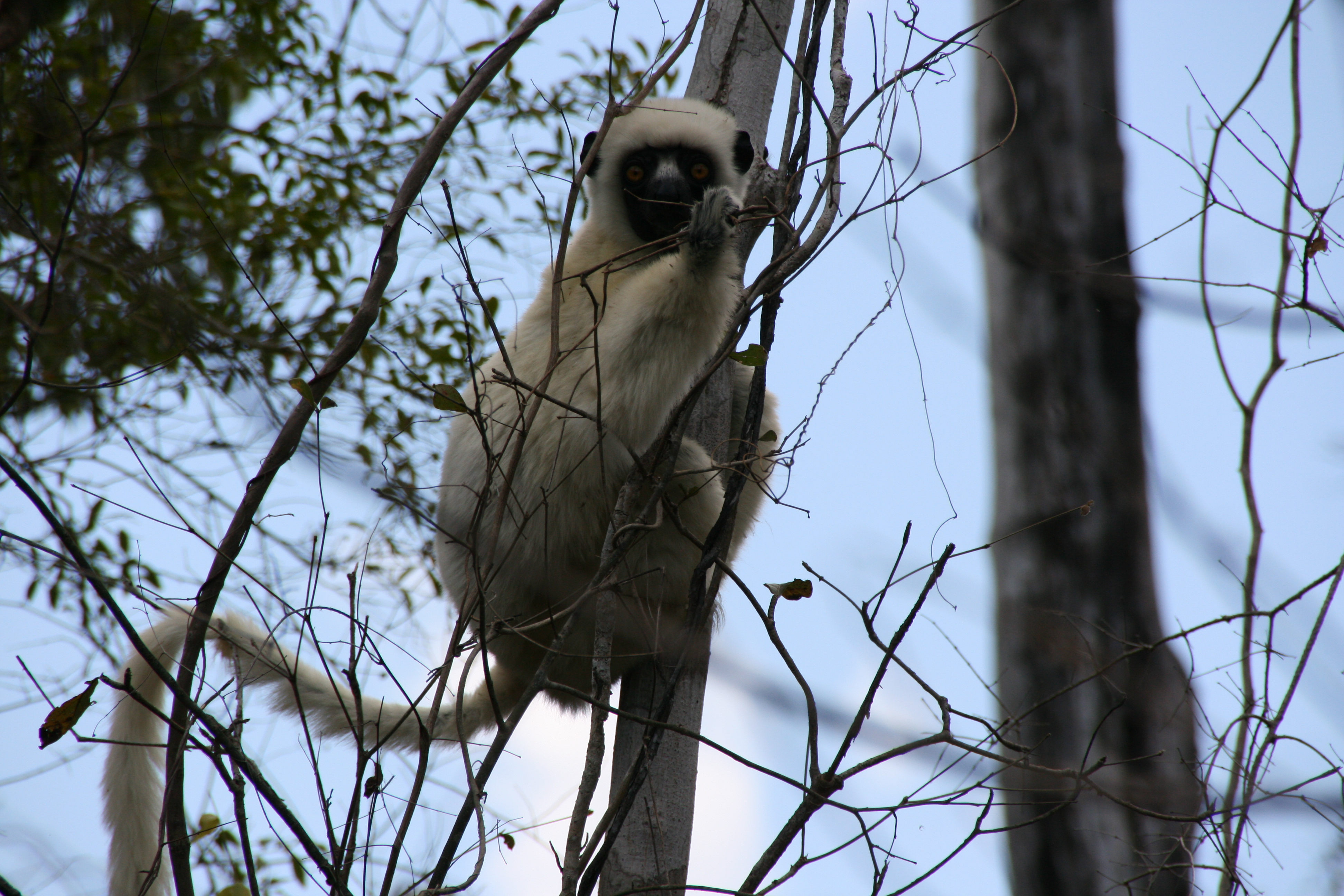 Tsingy de Bemaraha - Madagascar